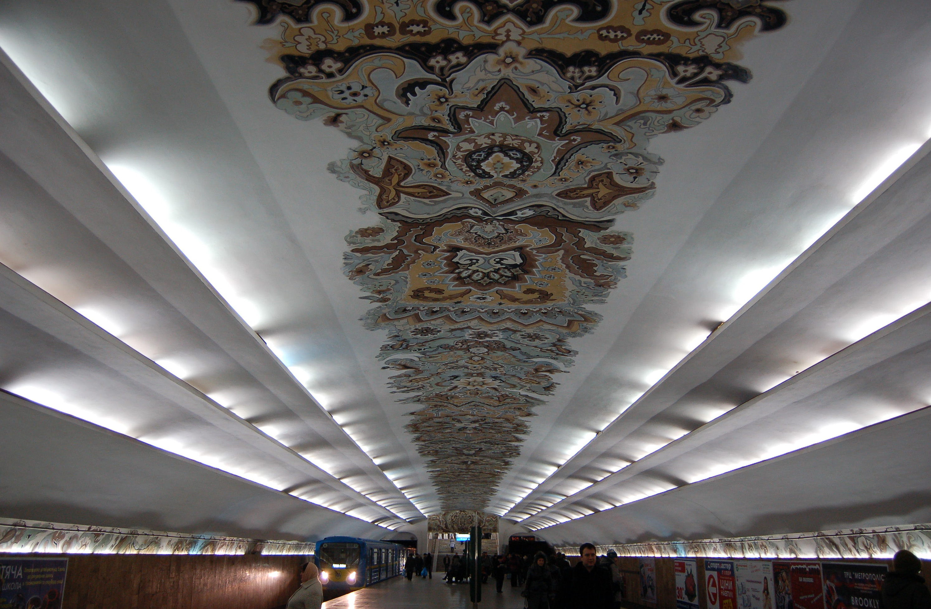 Cтанция метро «Минская»